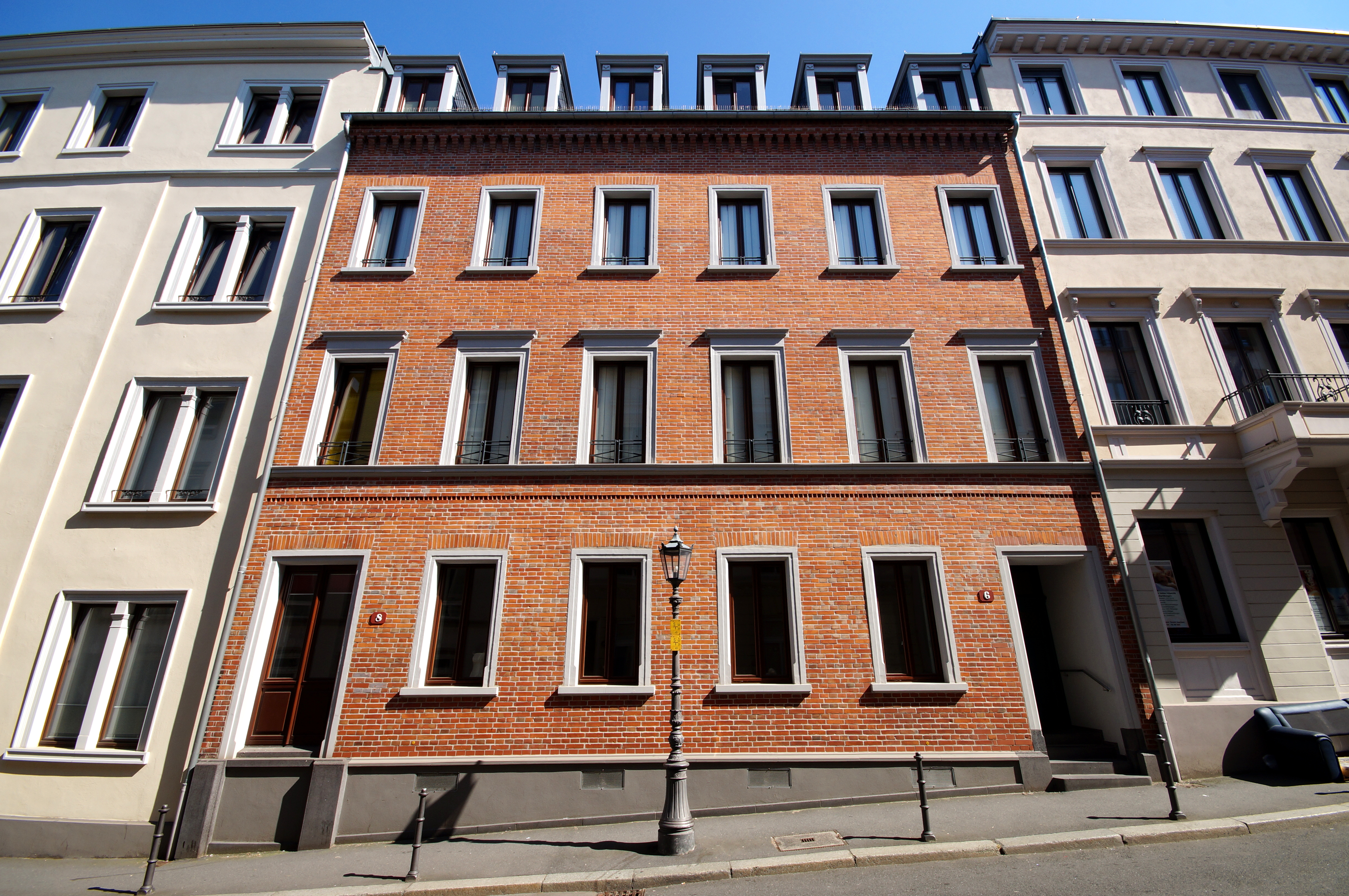 Fassade des Doppelhauses Emmerich-Josef-Straße 6/8 in Mainz-Altstadt